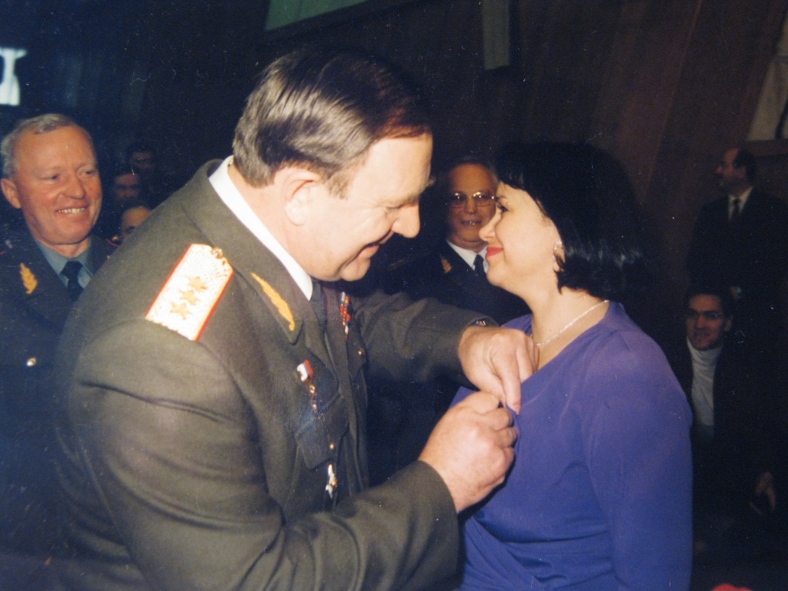 Председатель РОСТО (ДОСААФ) генерал-полковник Алексей Иванович Анохин вручает Татьяне Кудрявцевой звание Заслуженный артист России